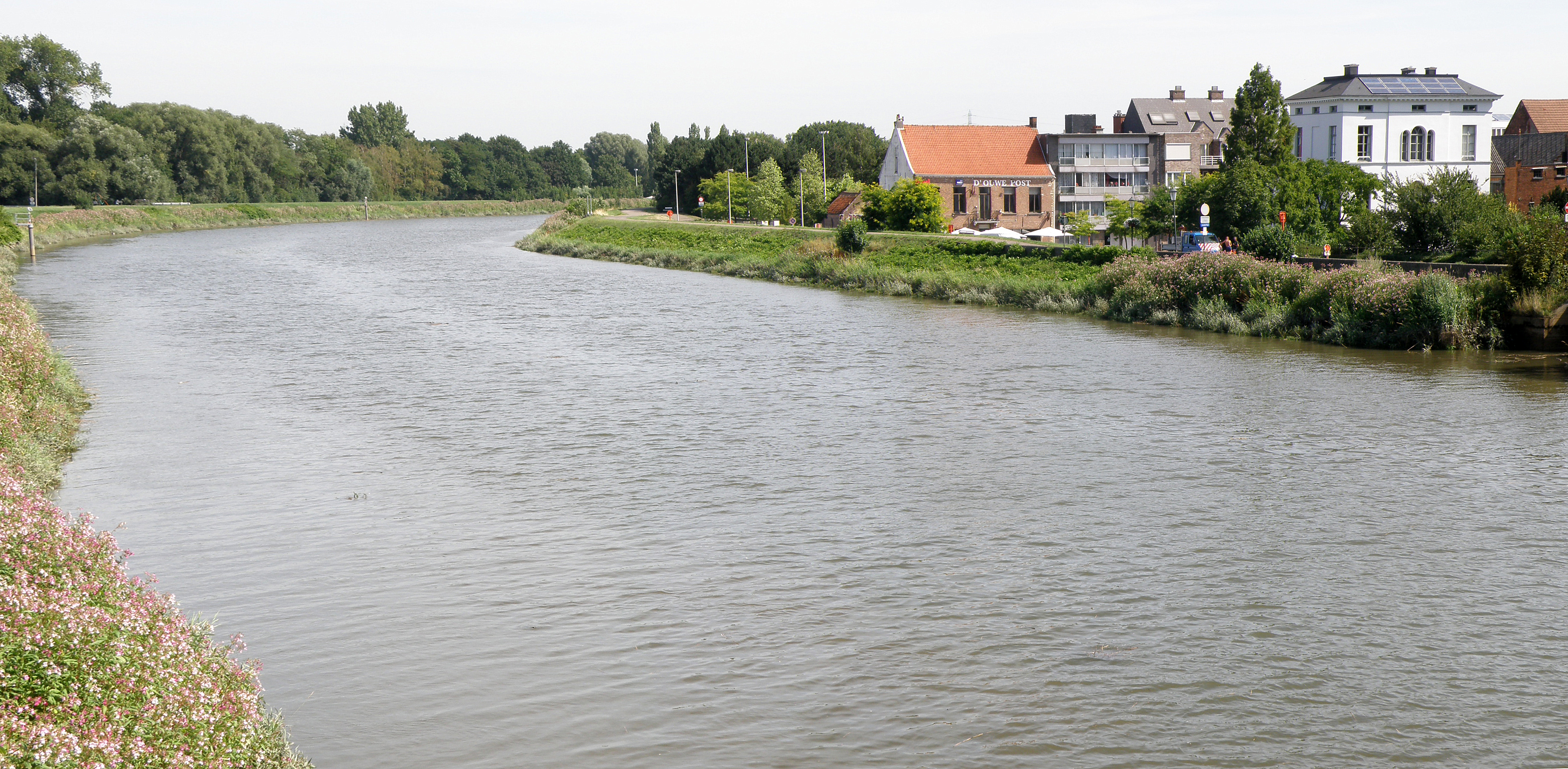 Duffel (prov. Antwerpen, België). Nete. Helemaal rechts: kasteeltje Perwijzebroek.